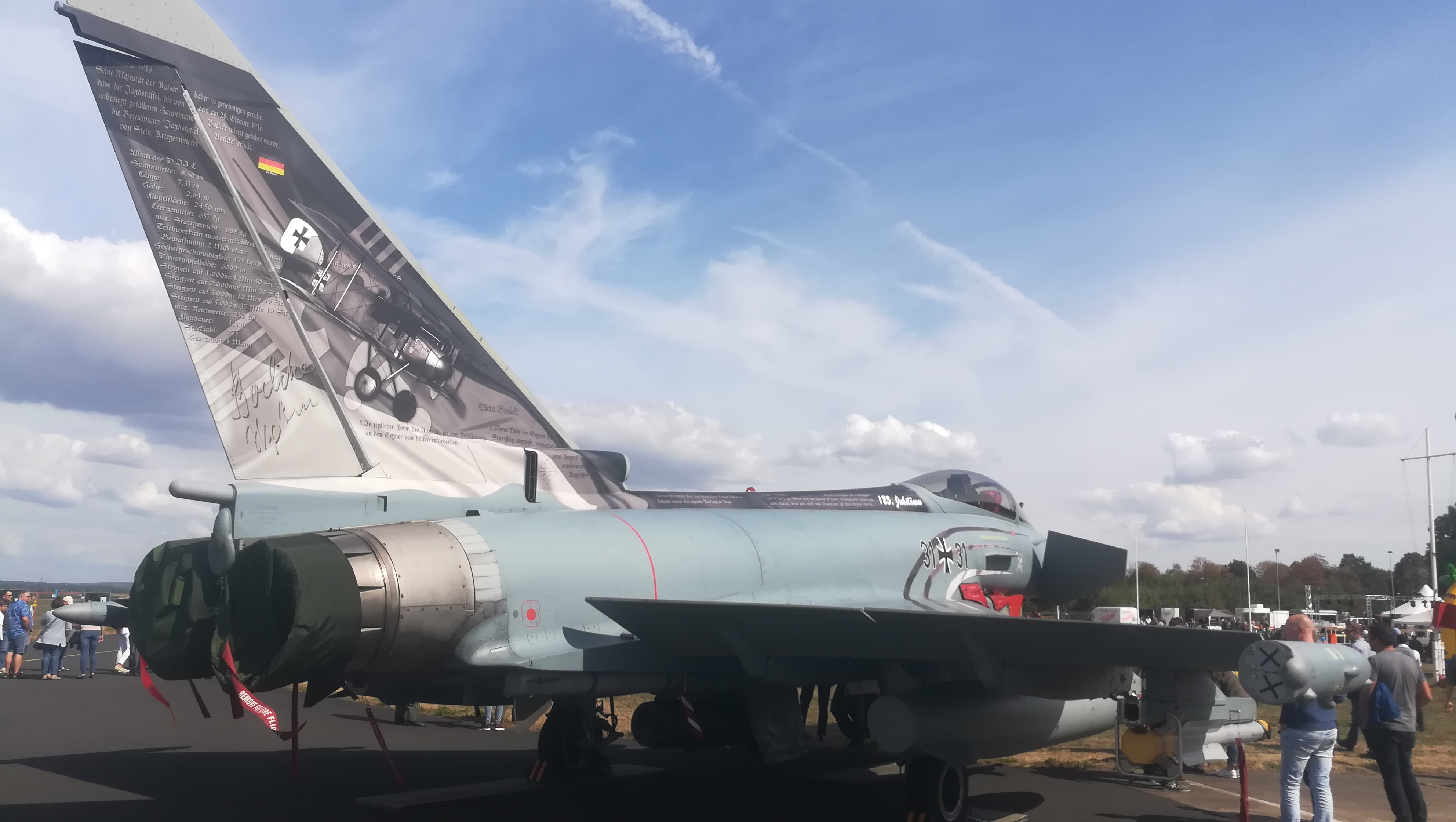 "Spirit of Oswald Boelcke" zum Gedenken an Hauptmann Oswald Boelcke, der als Vater des Luftkampfes gilt. Die Maschine mit dem Kennzeichen 31+31 würde mit Spezialfolie foliert.